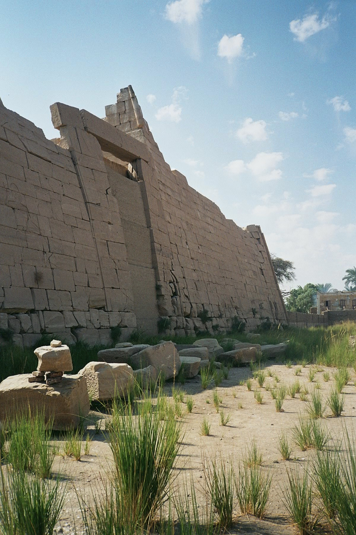 Pylon Ramesseum, Luxor, Egypte